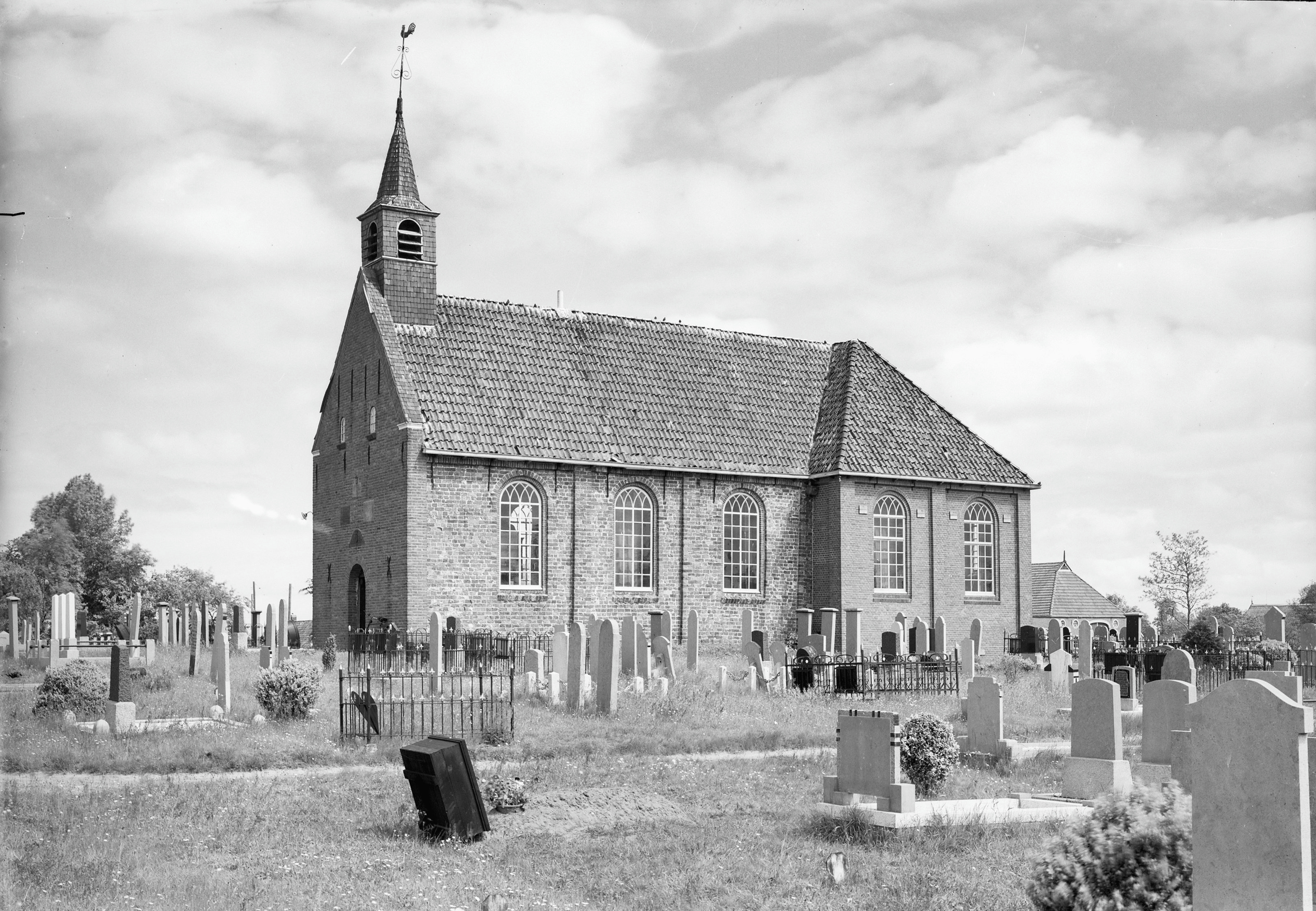 Hervormde Kerk met klokketoren: kerk vanuit het zuiden - Opende, Provincialeweg 158 - Protestantsekerk - anno 1748